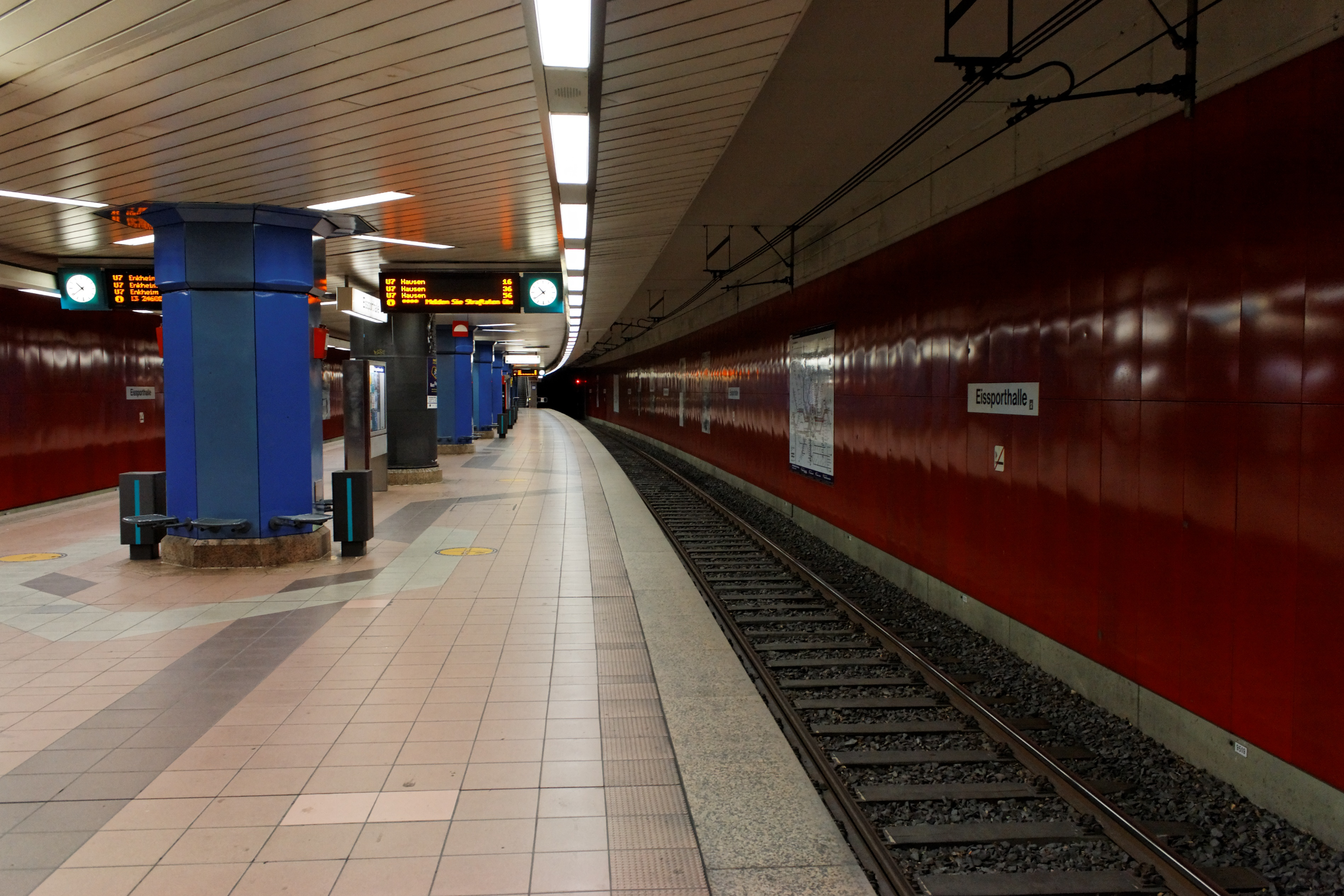 U-Bahn-Station Eissporthalle der U-Bahn Frankfurt